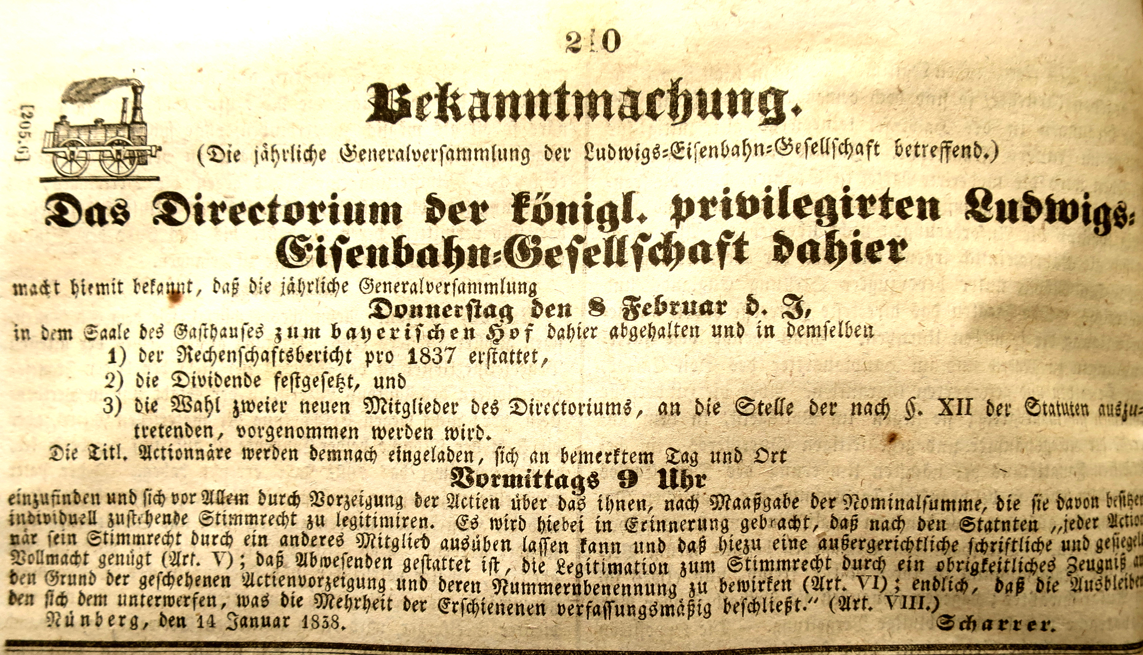 Aufruf zur Aktionärsversammlung der Ludwigs-Eisenbahn-Gesellschaft 1838. In: Allgemeine Zeitung (Augsburg) Nr. 29 vom Montag, den 29. Januar 1838, S. 210